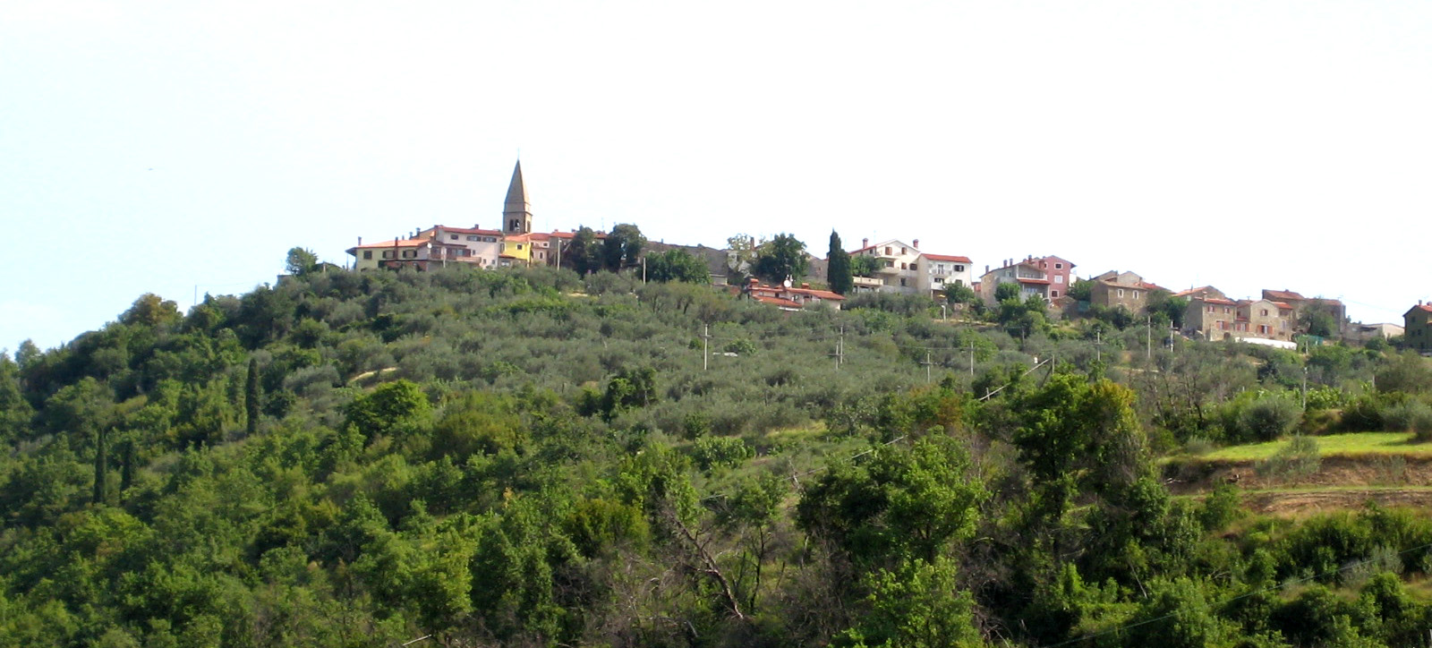 Padna, village in Slovenia